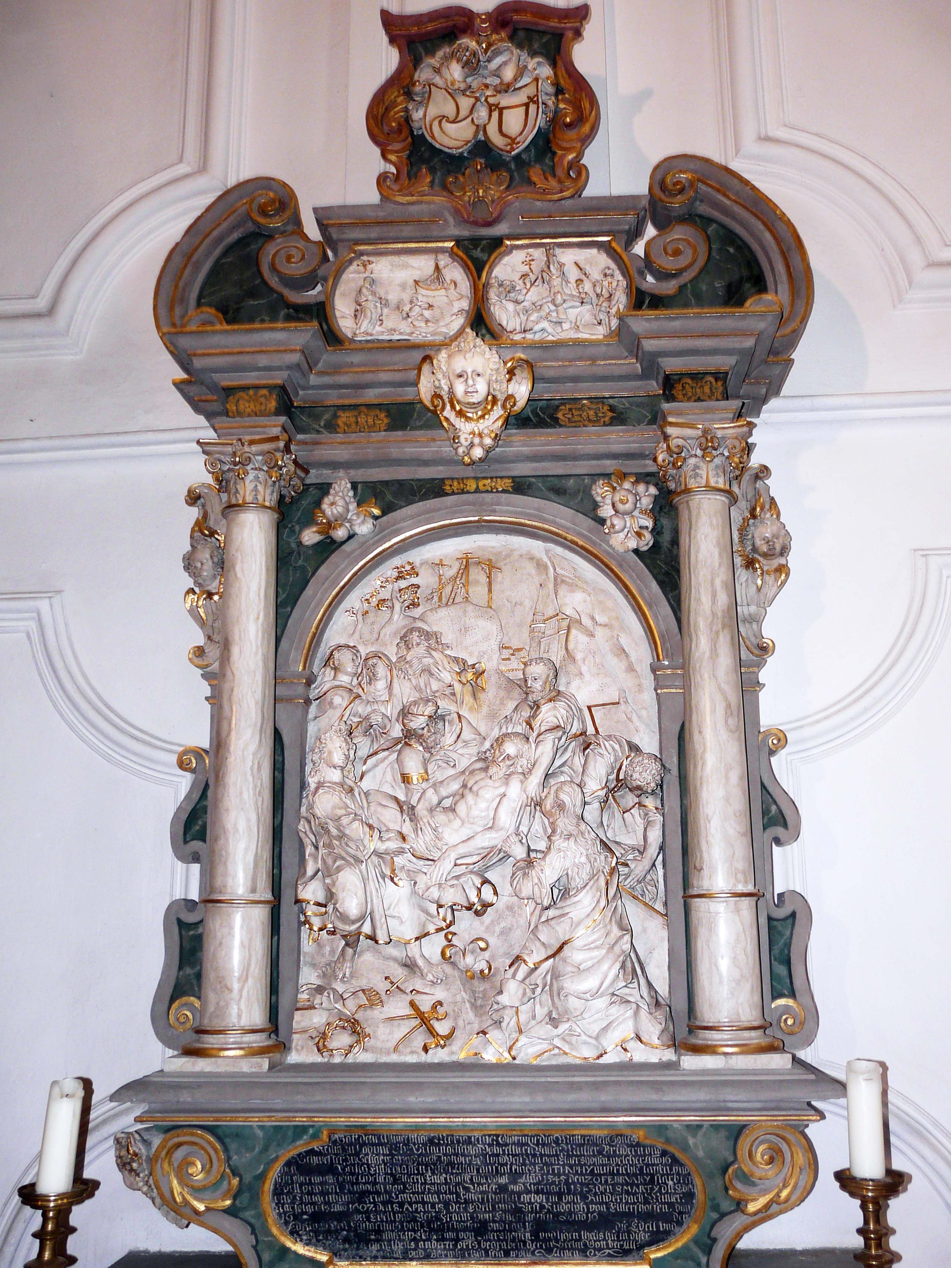 Алтарь Петра и Павлв